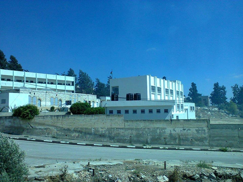 إحدى مدارس قرية فرعون